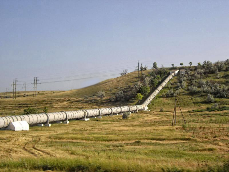 дюкер. duiker. Межгорное водохранилище.